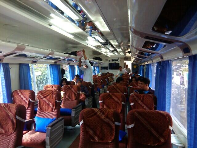 Eksekutif campuran Kereta api Sawunggalih Utama.